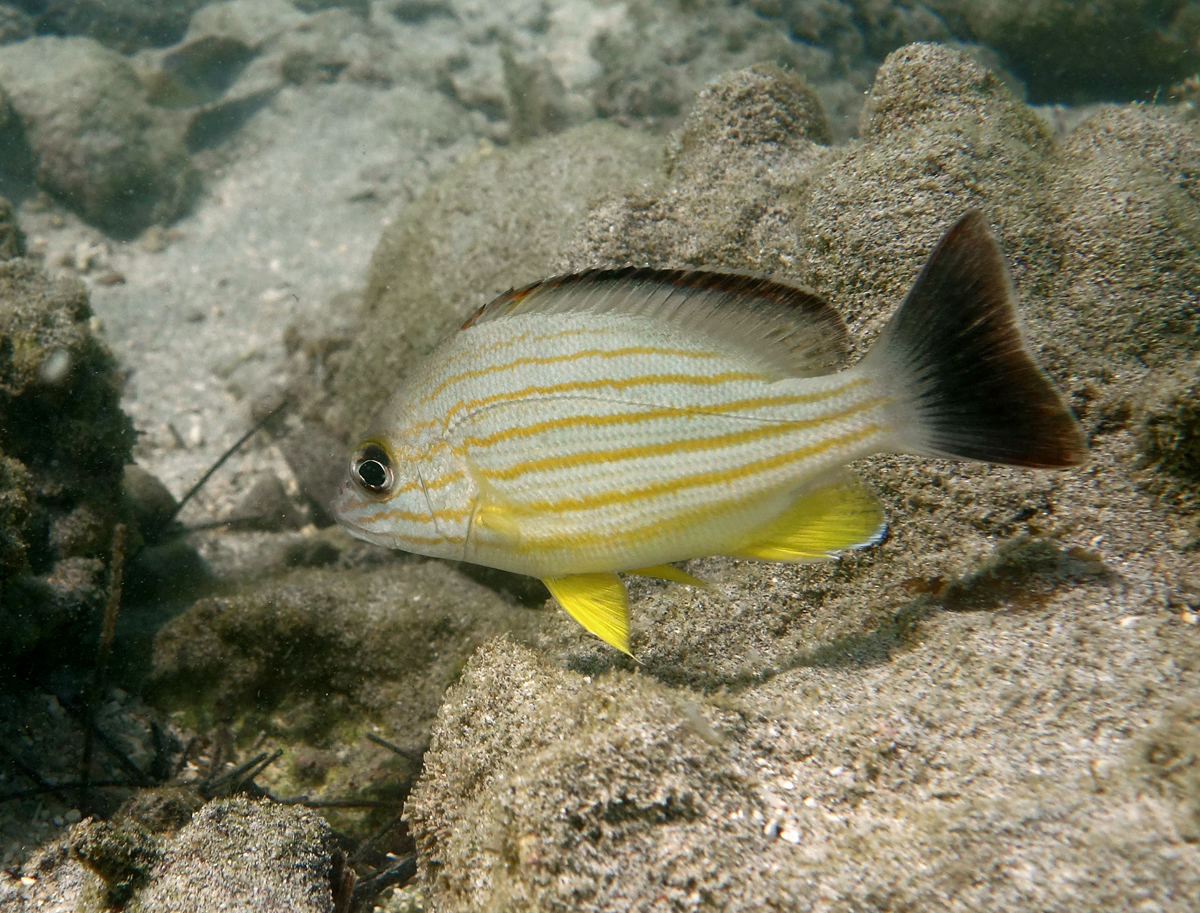 Un vivaneau queue noire (Lutjanus fulvus) à la Réunion.